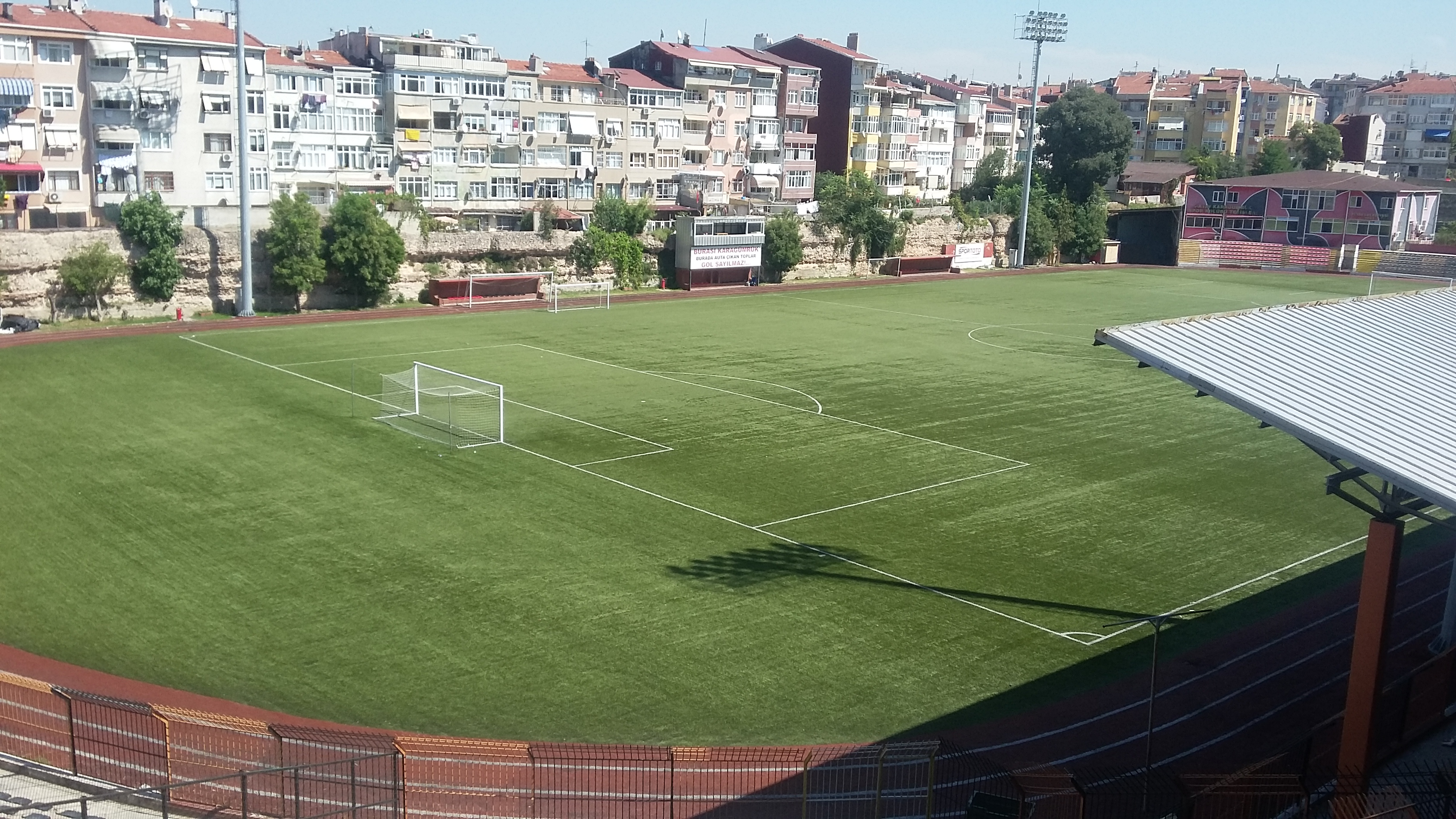 Vefa Stadyumu, Fatih Karagümrük